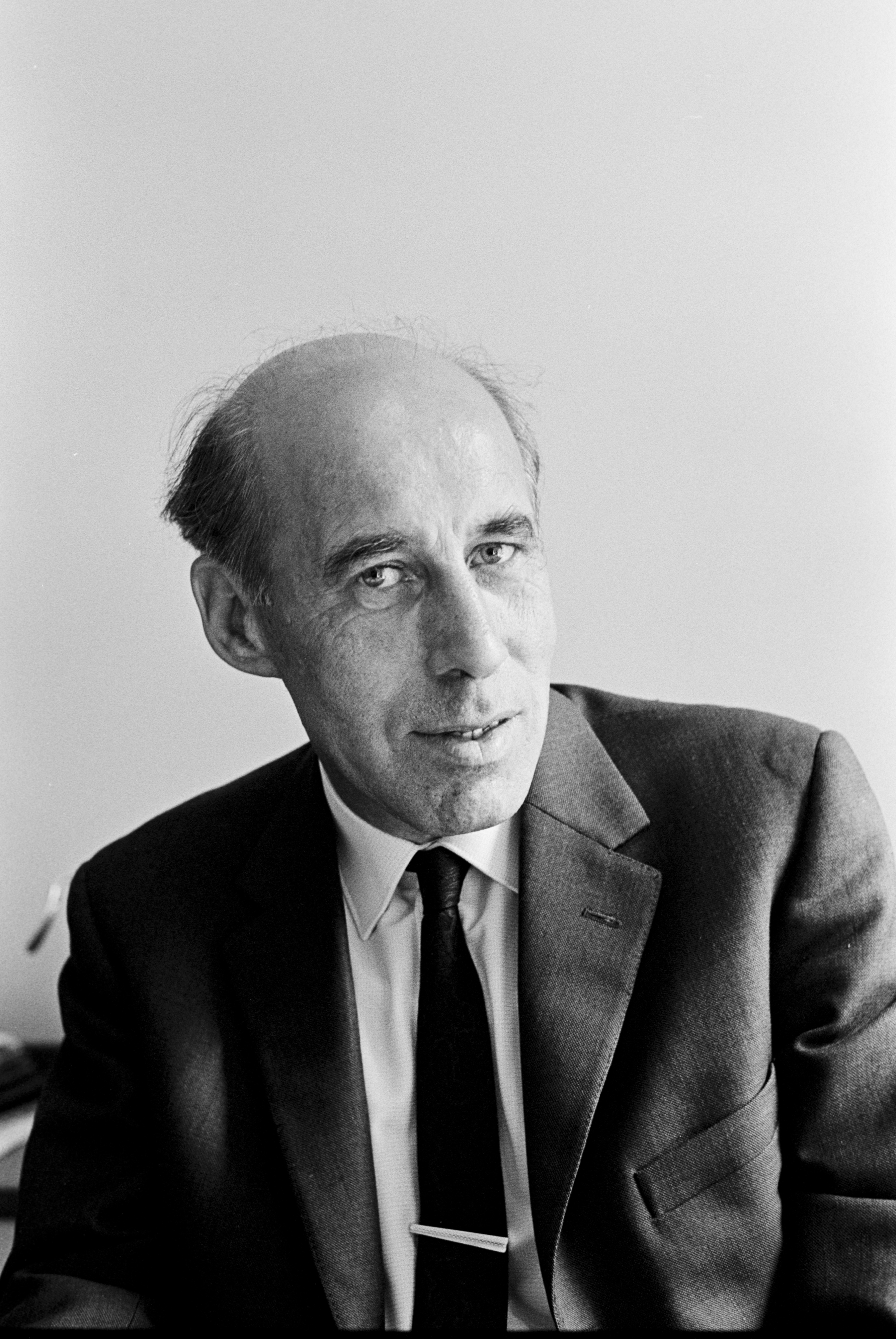 Portrett av pressemanen og politikeren Guttorm Hansen.